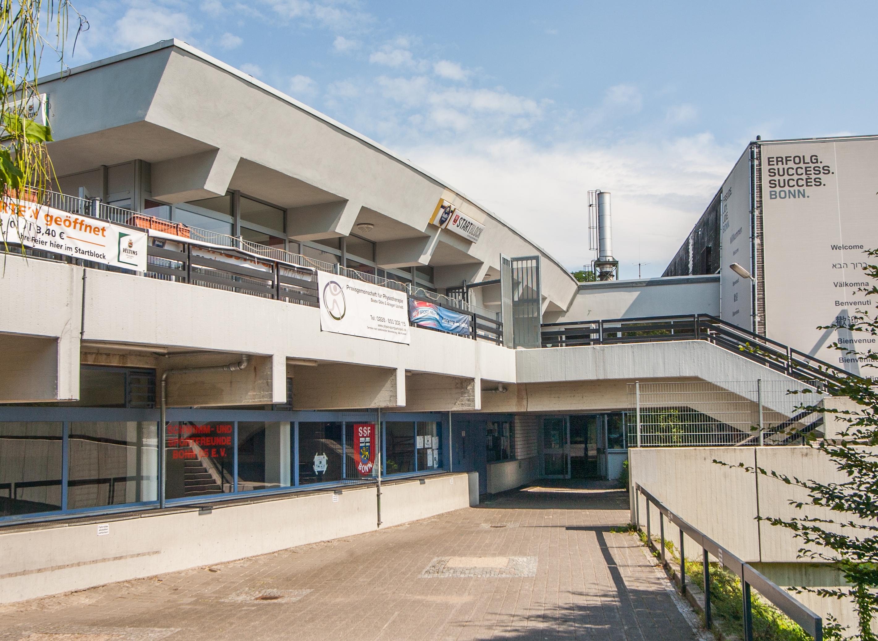 Sportpark Nord, Bonn: Sporthallenzentrum, Ansicht aus Westen